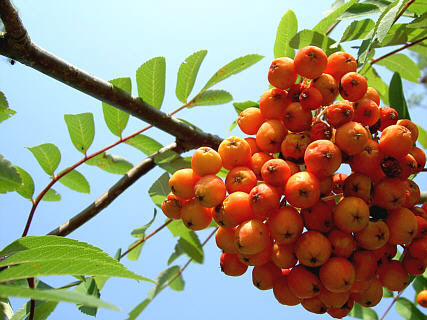 Reife Vogelbeeren (Sorbus aucuparia)